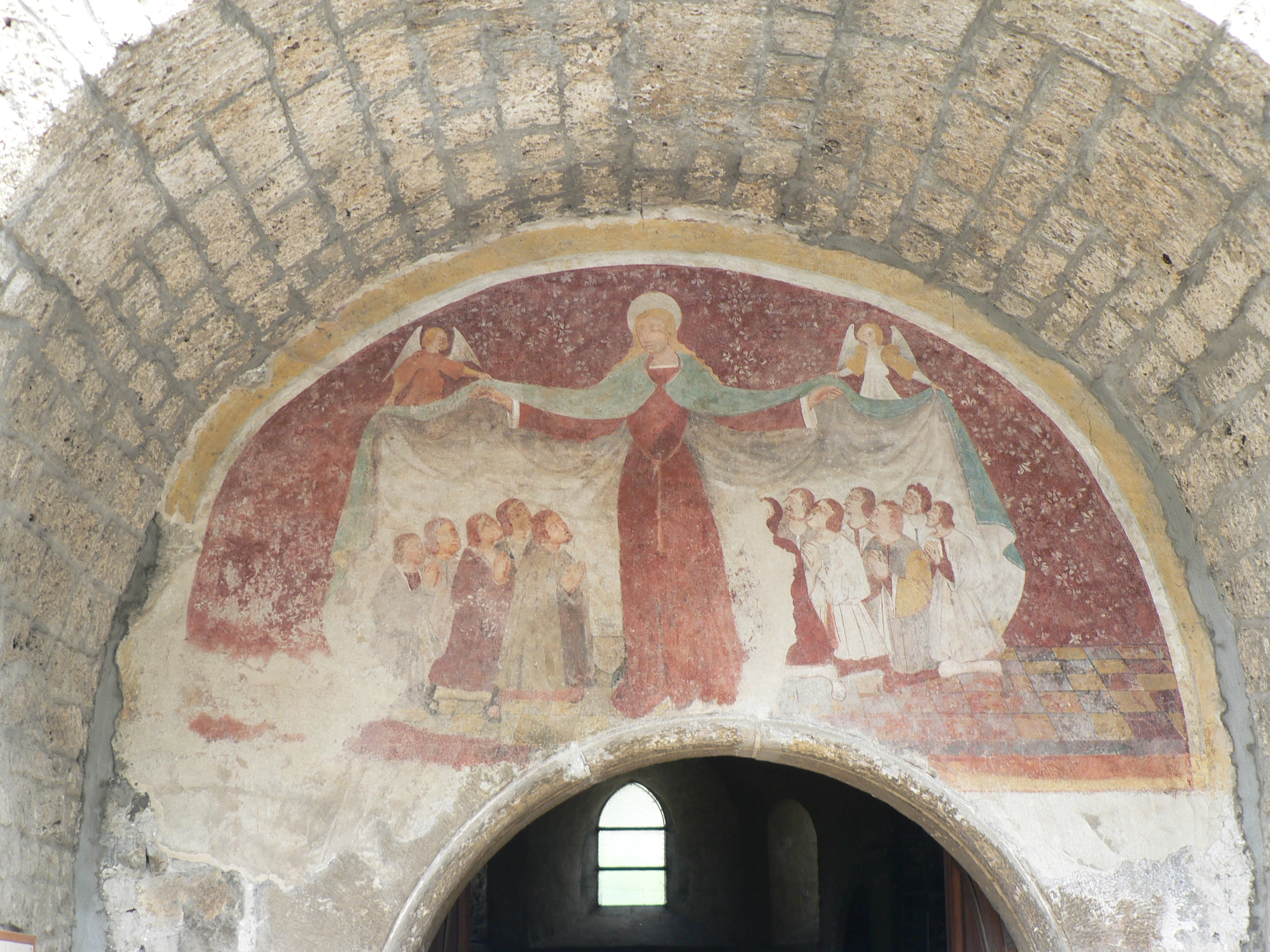 Eglise de Genevrey de Vif - porche .